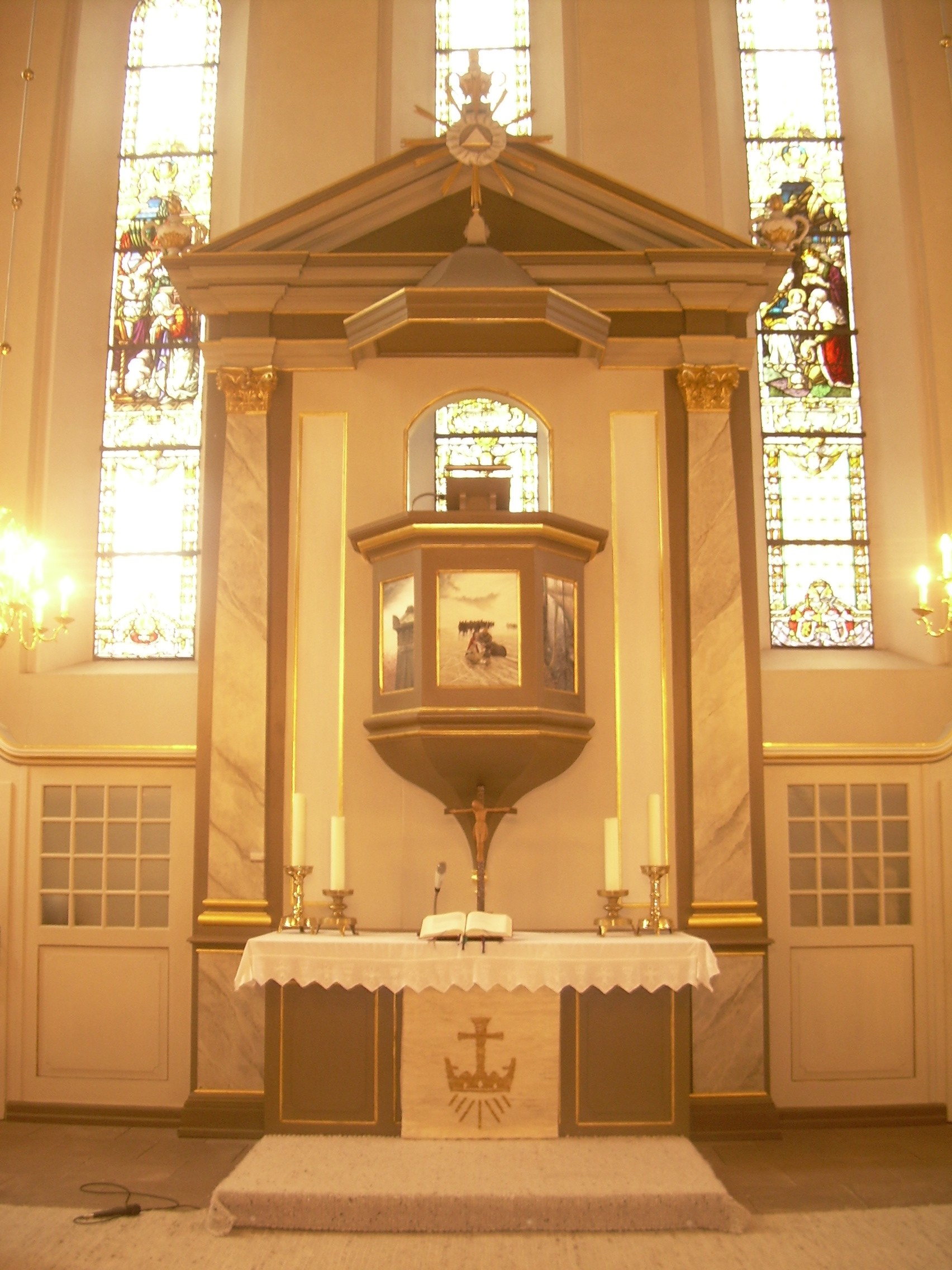 Innenansicht der Klosterkirche Oldenstadt in Uelzen, Niedersachsen, Deutschland; Kanzelbilder von Hermann Buß (* 1951)